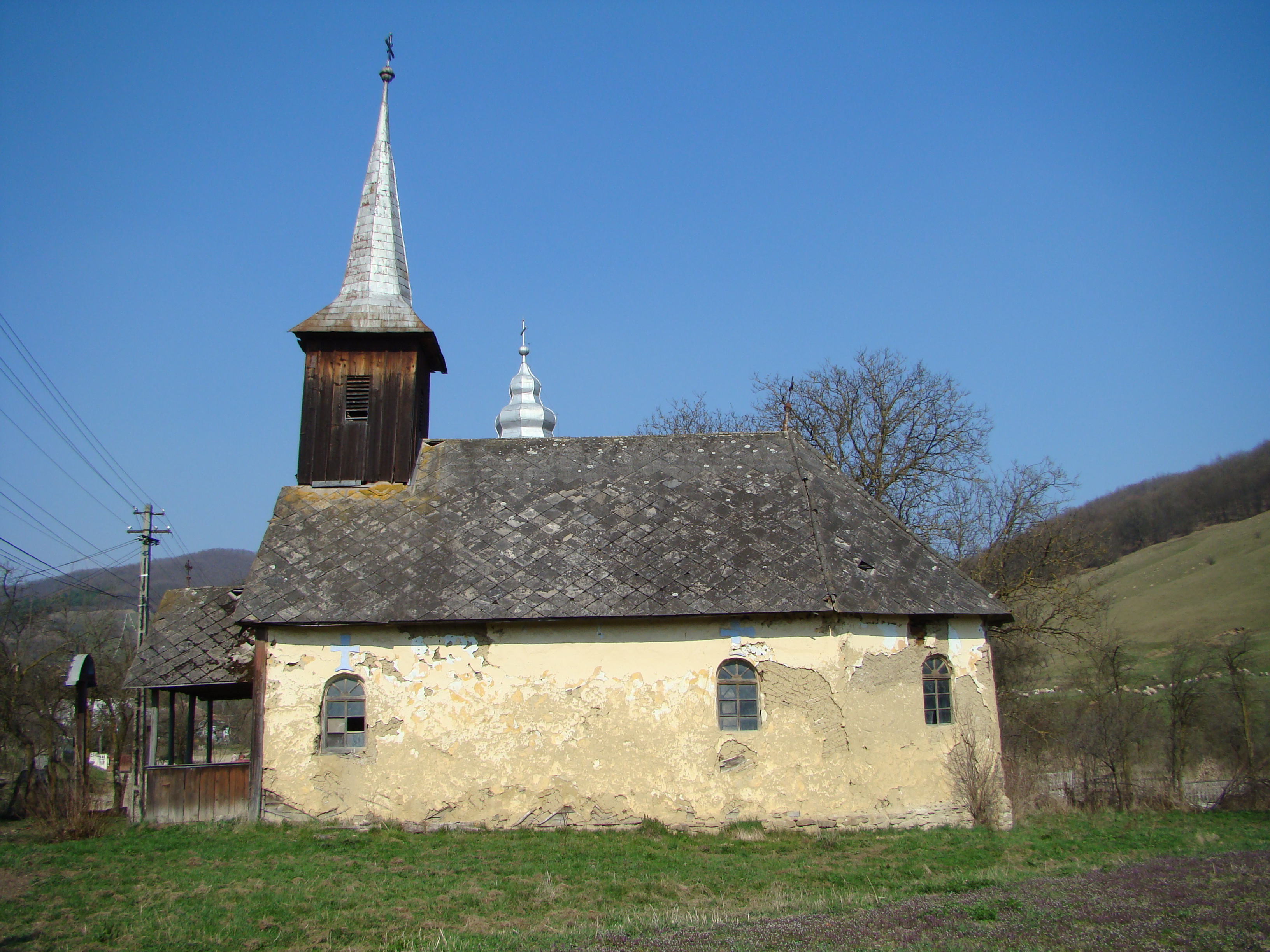 Biserica de lemn greco-catolică, Sălișca Deal, județul Cluj